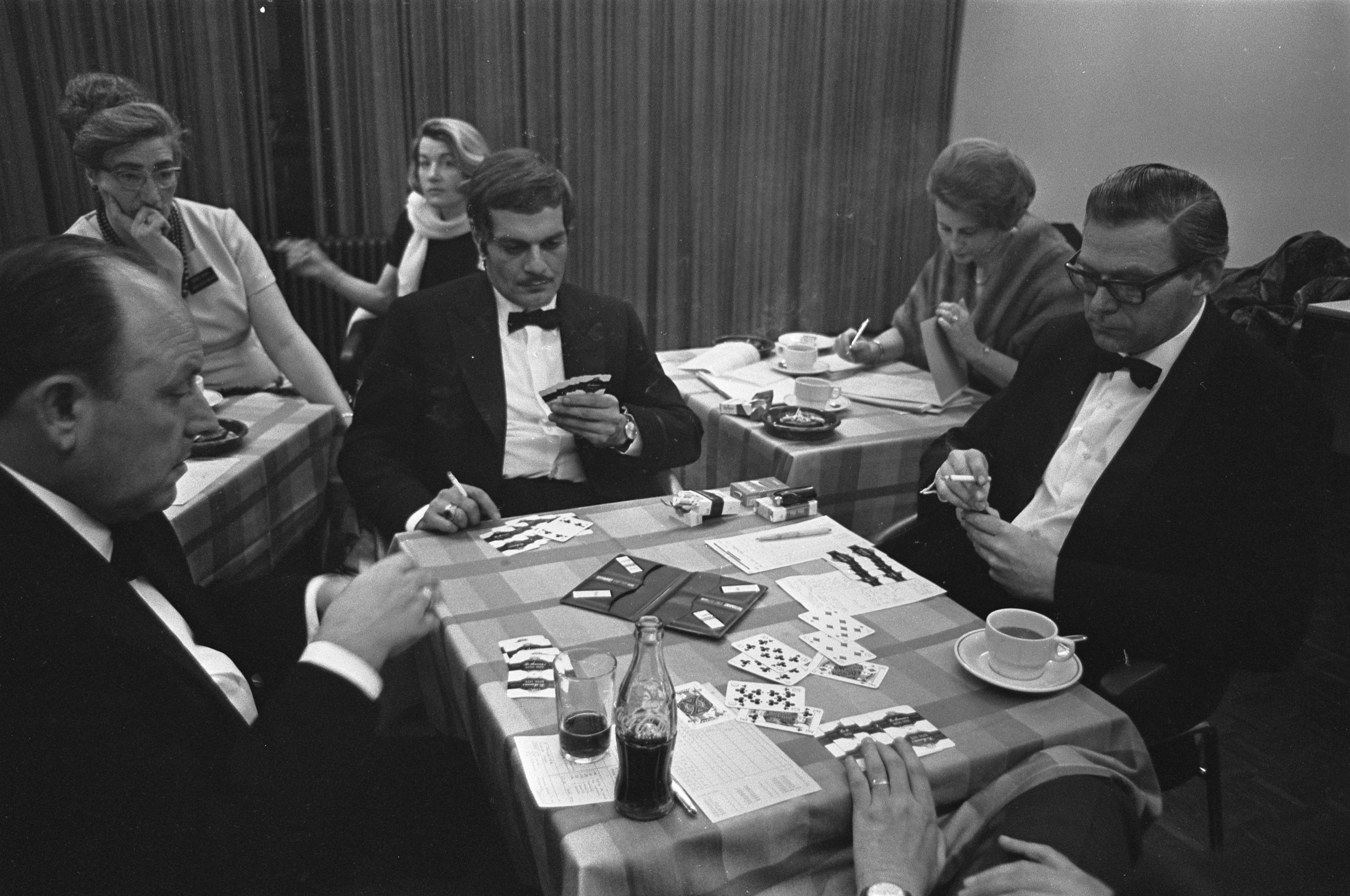 Collectie / Archief : Fotocollectie Anefo Reportage / Serie : [ onbekend ] Beschrijving : Bridge demonstratie van Omar Sharif in RAIi Datum : 9 december 1967 Trefwoorden : demonstraties Persoonsnaam : Sharif, Omar Fotograaf : Kroon, Ron / Anefo Auteursrechthebbende : Nationaal Archief Materiaalsoort : Negatief (zwart/wit) Nummer archiefinventaris : bekijk toegang 2.24.01.05 Bestanddeelnummer : 920-9139